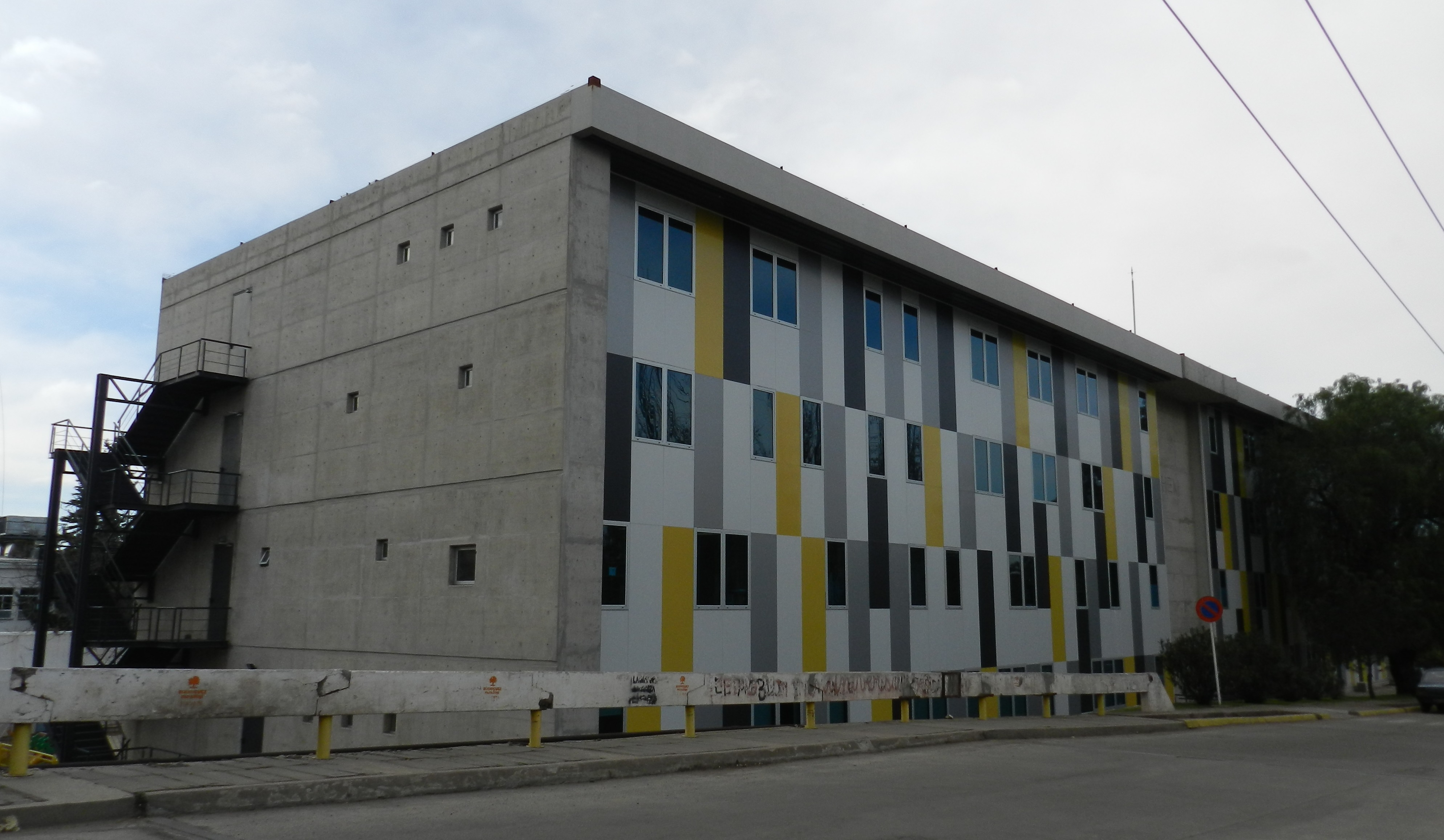 Sede del Instituto de Histología y Embriología de Mendoza, Facultad de Ciencias Médicas, Universidad Nacional de Cuyo, Mendoza.